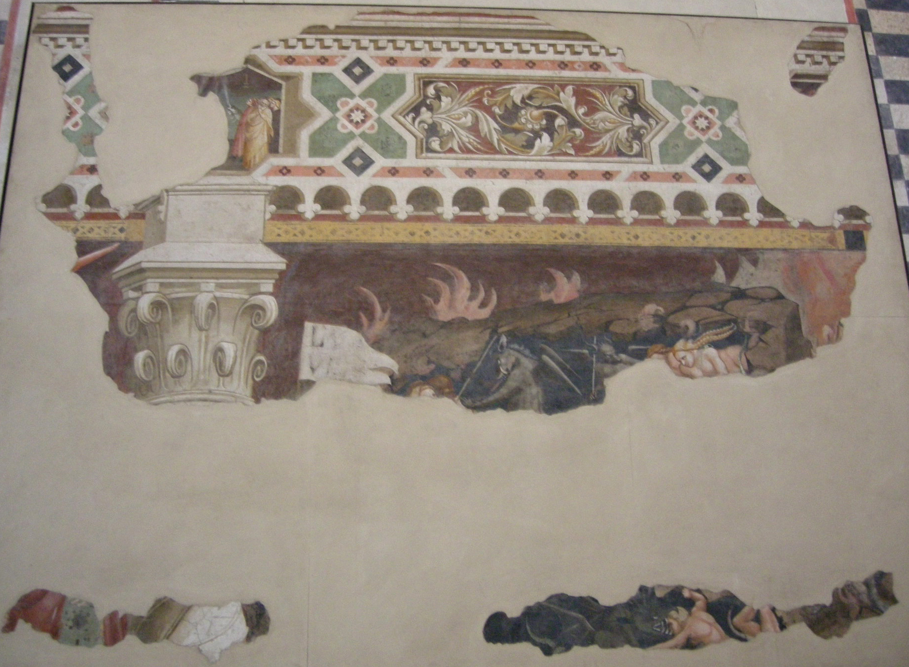 Refettorio santa croce, frammento di andrea orcagna